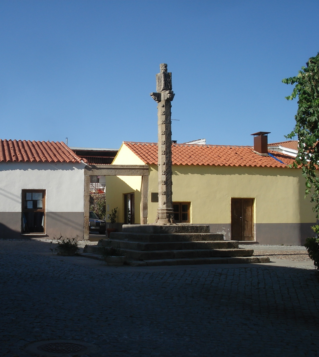 o pelourinho de frechas